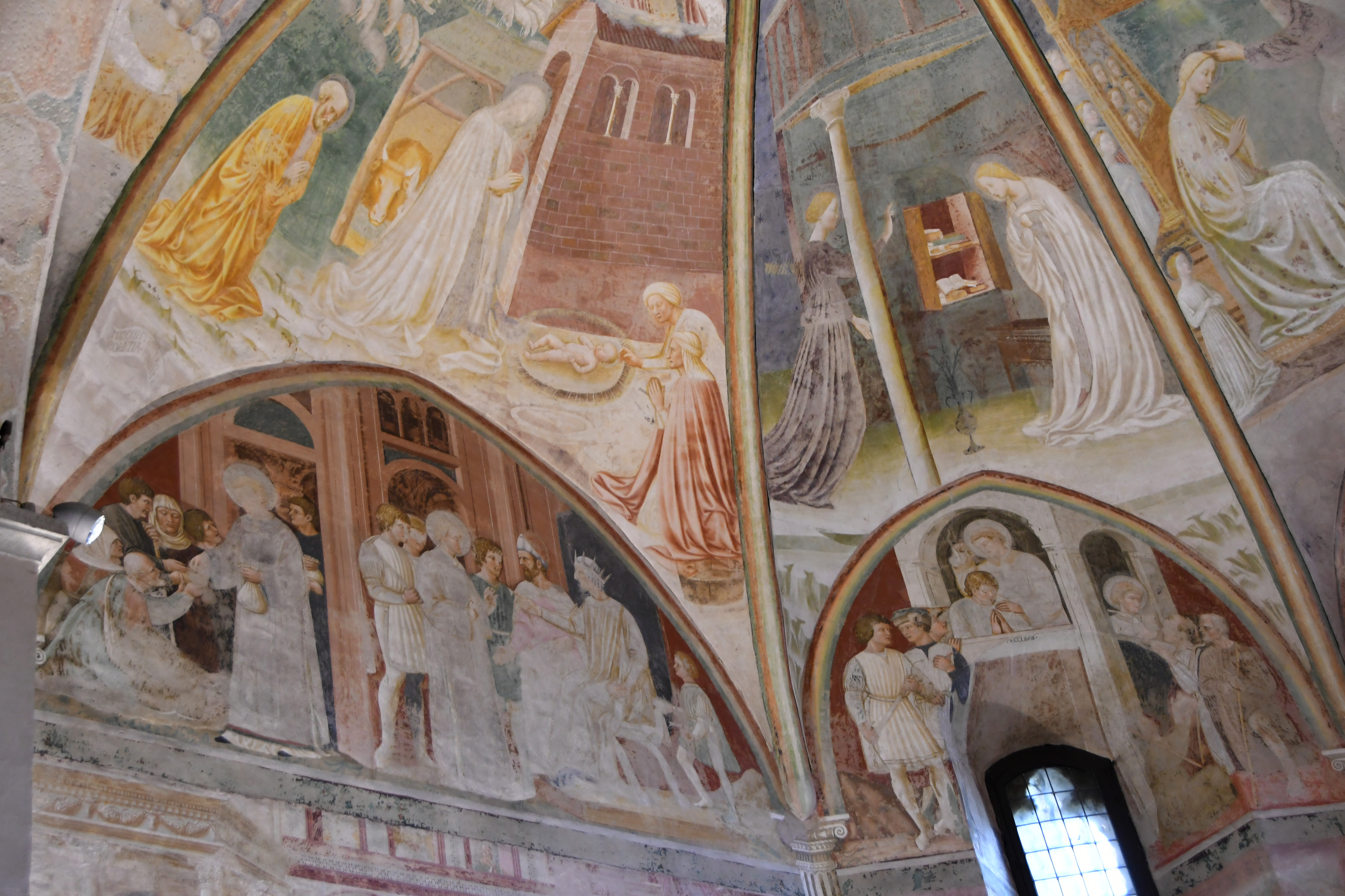 lunetta del portale della collegiata di Castiglione Olona che reca la data del 1428